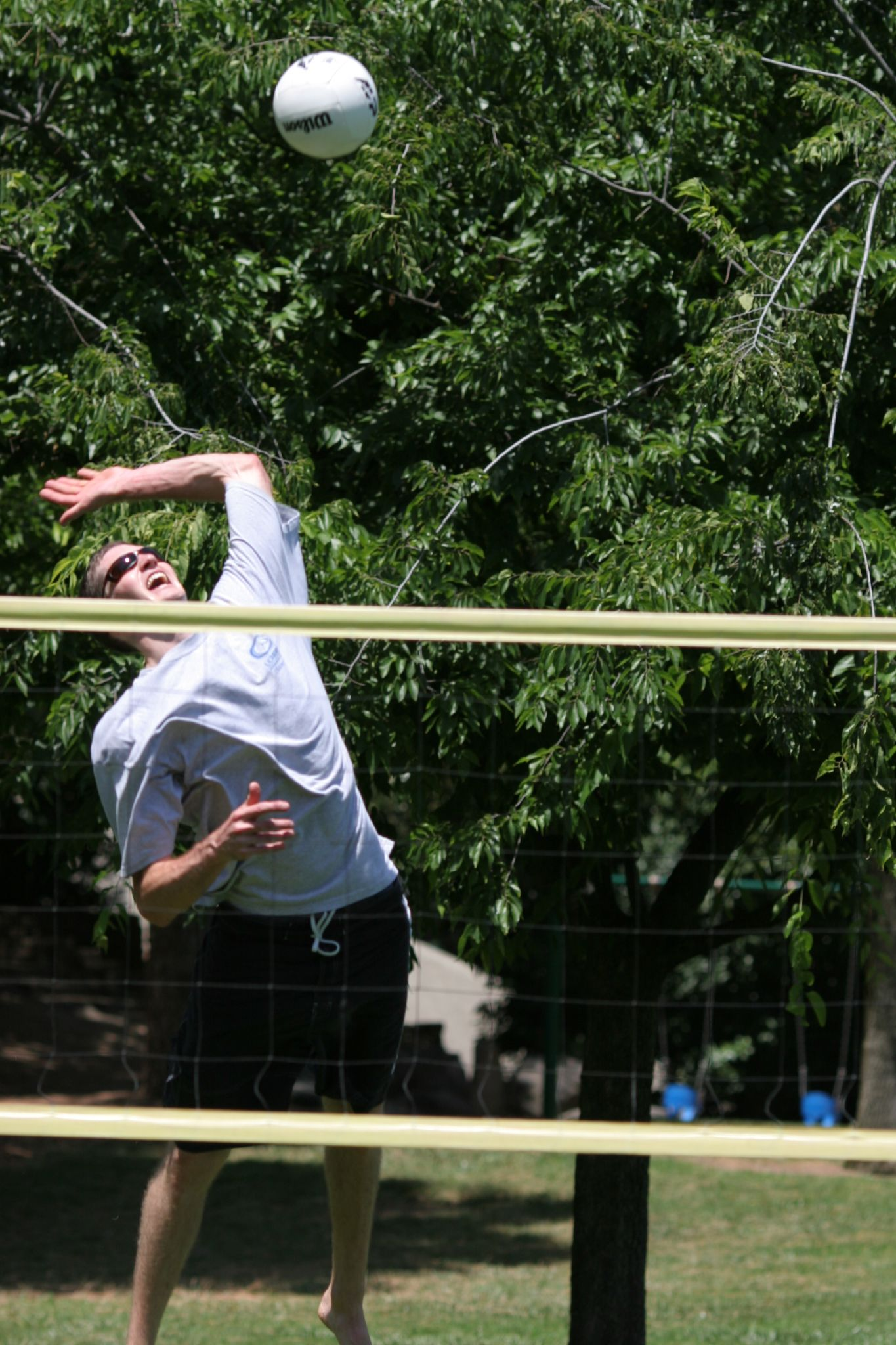 Volleyball spike